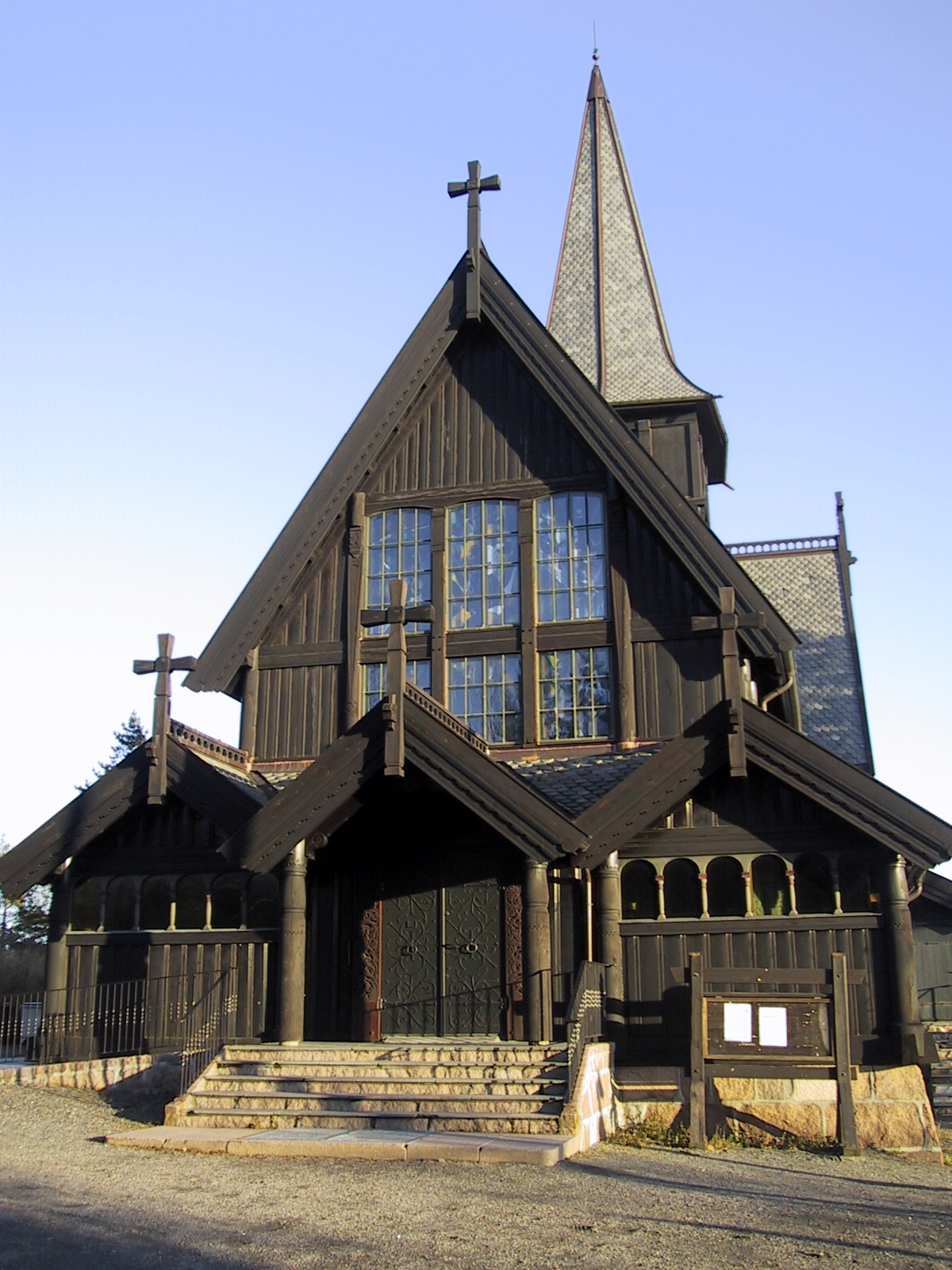 Holmenkollen kapell i Oslo